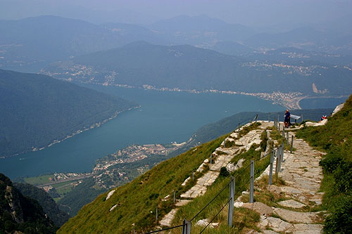 Ausblick nordwärts vom Monte Generoso (Lago di Lugano / Melide)